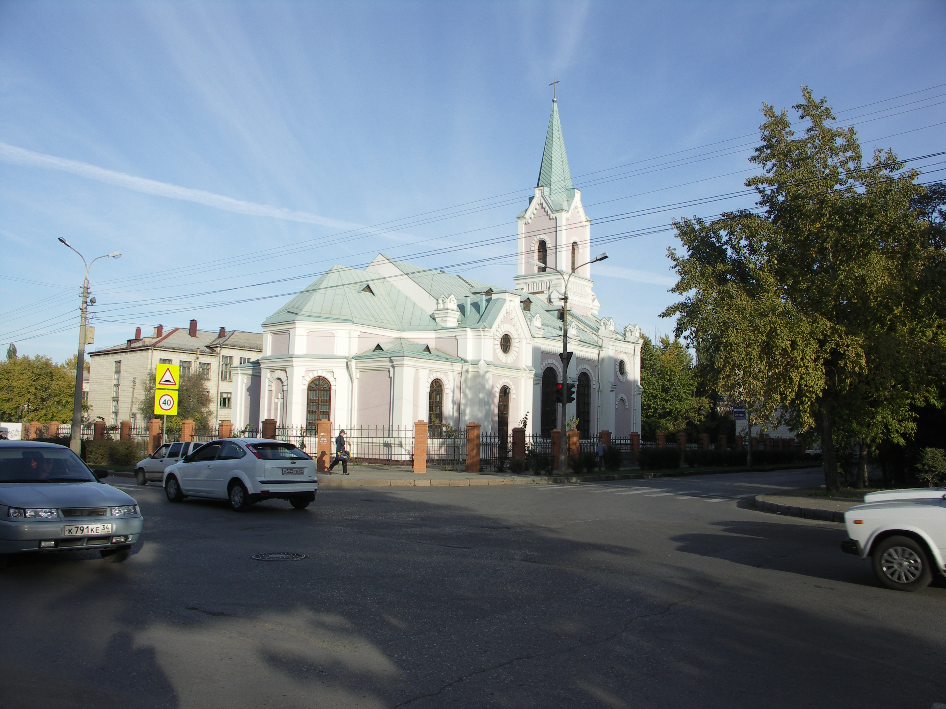 Католическая Церковь св. Николая в Волгограде